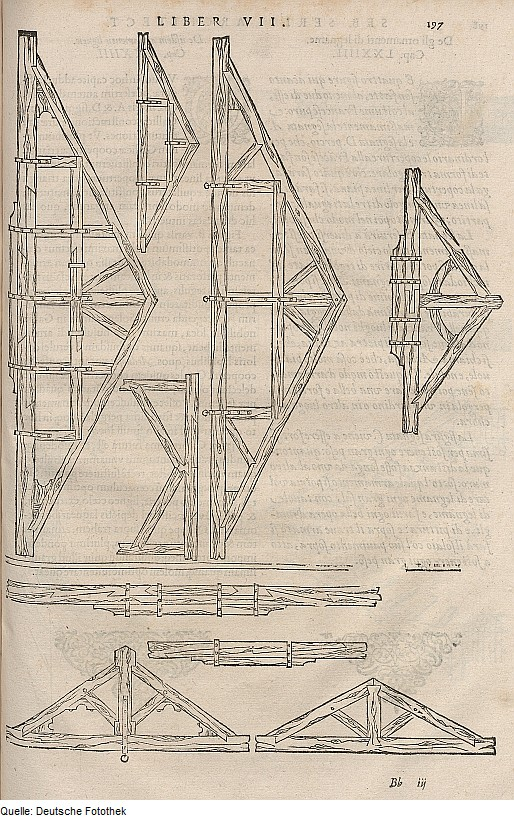 Original image description from the Deutsche Fotothek Architektur & Baukunst & Gerüst & Holz & Konstruktion